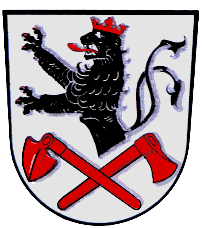 Rothhausen ist ein Gemeindeteil der Gemeinde Thundorf in Unterfranken im bayerischen Landkreis Bad Kissingen.